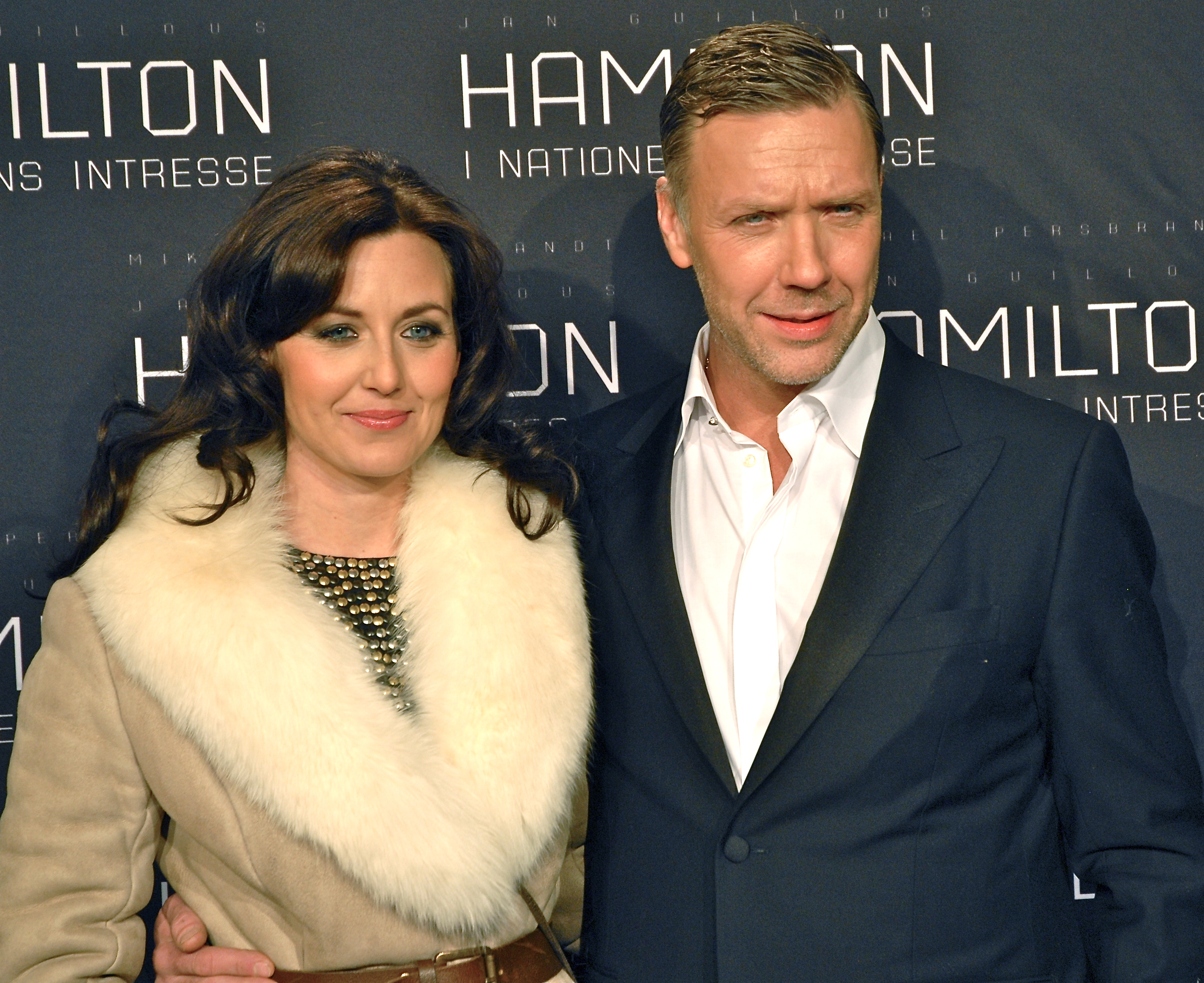 Sanna Lundell och Mikael Persbrandt på galapremiären av Hamilton - I nationens intresse, på biograf Sergel i Stockholm den 9 januari 2012.